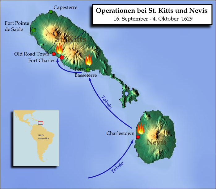 Karte der Eroberung der Inseln St. Kitts und Nevis durch spanische Truppen während des Englisch-Spanischen Krieges (1625–1630).